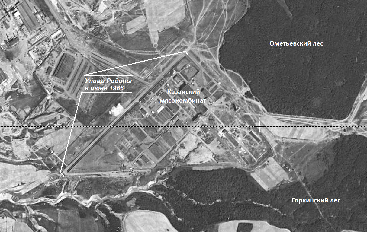 Казань. Улица Родины на снимке с американского спутника (7 июня 1966)